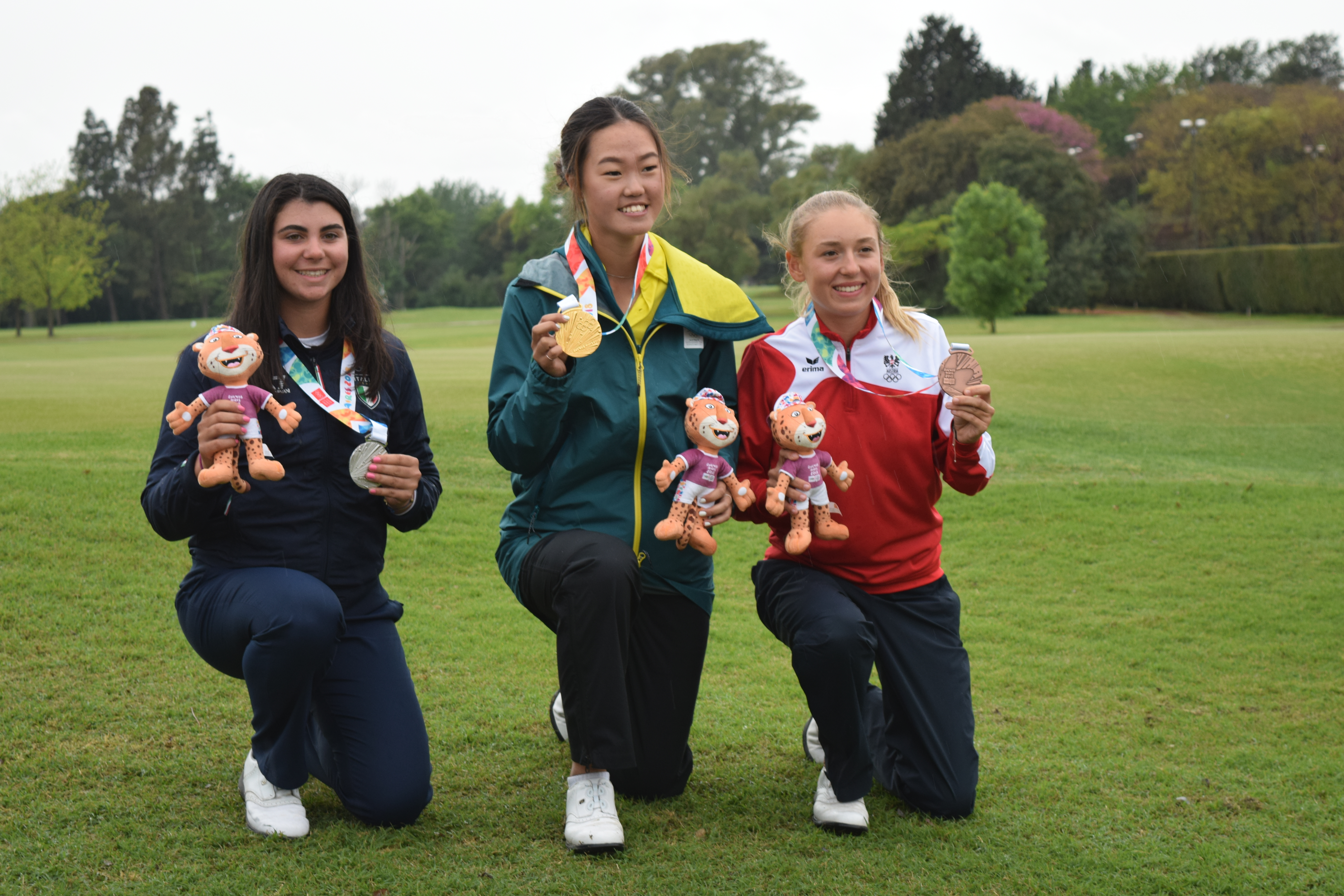 ercera ronda y final de Golf, durante los Juegos Olímpicos de la Juventud 2018 en Buenos Aires.